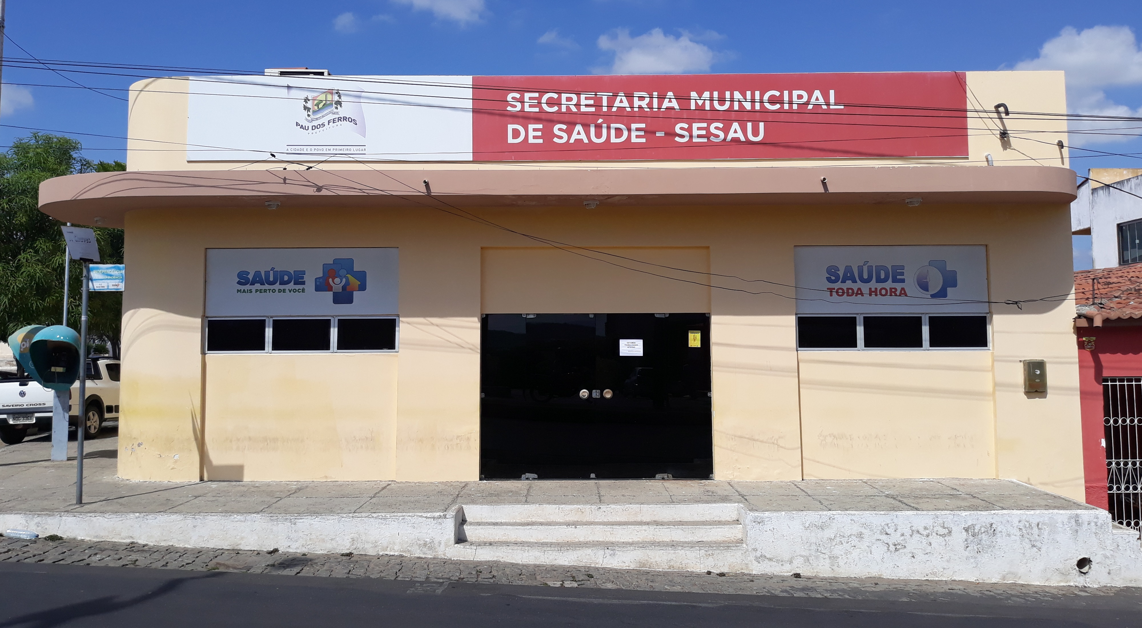 Atual sede da Secretaria Municipal de Saúde, na Avenida da Independência, centro de Pau dos Ferros, Rio Grande do Norte (Brasil)